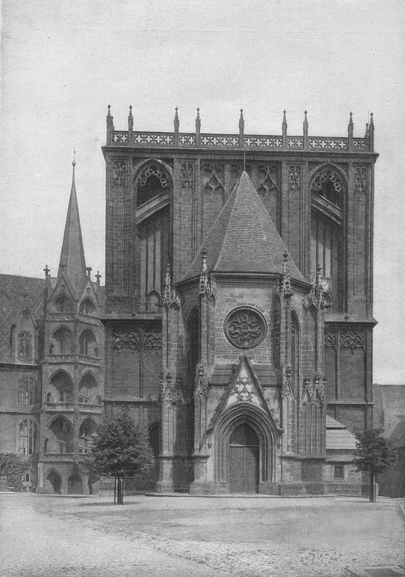 Westfassade des Meißner Doms vor Errichtung der neugotischen Türme.